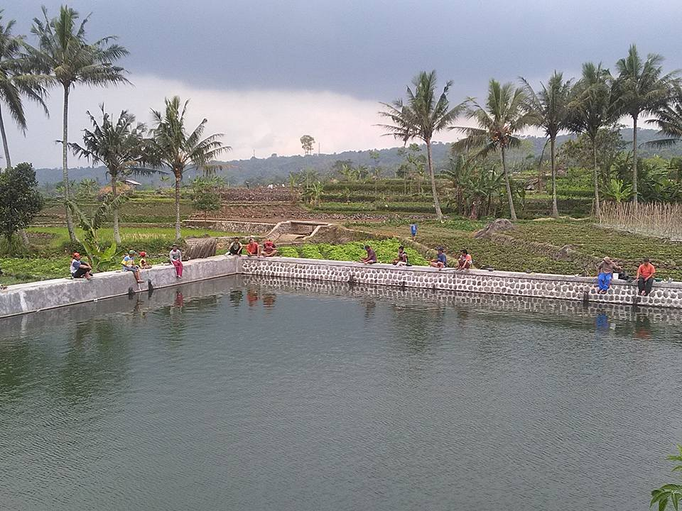 Setu Tegaljugul salah satu obyek wisata murah meriah